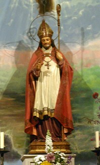 Imatge de Sant Ponç, a la capella homònima de l'Església de Sant Agustí de Barcelona. Patró dels herbolaris i apicultors.